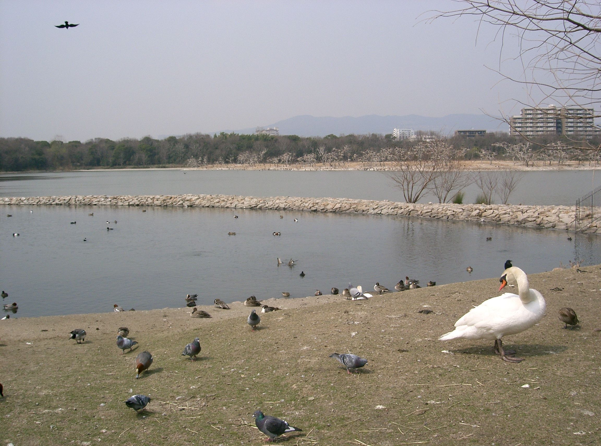 Koyaike park